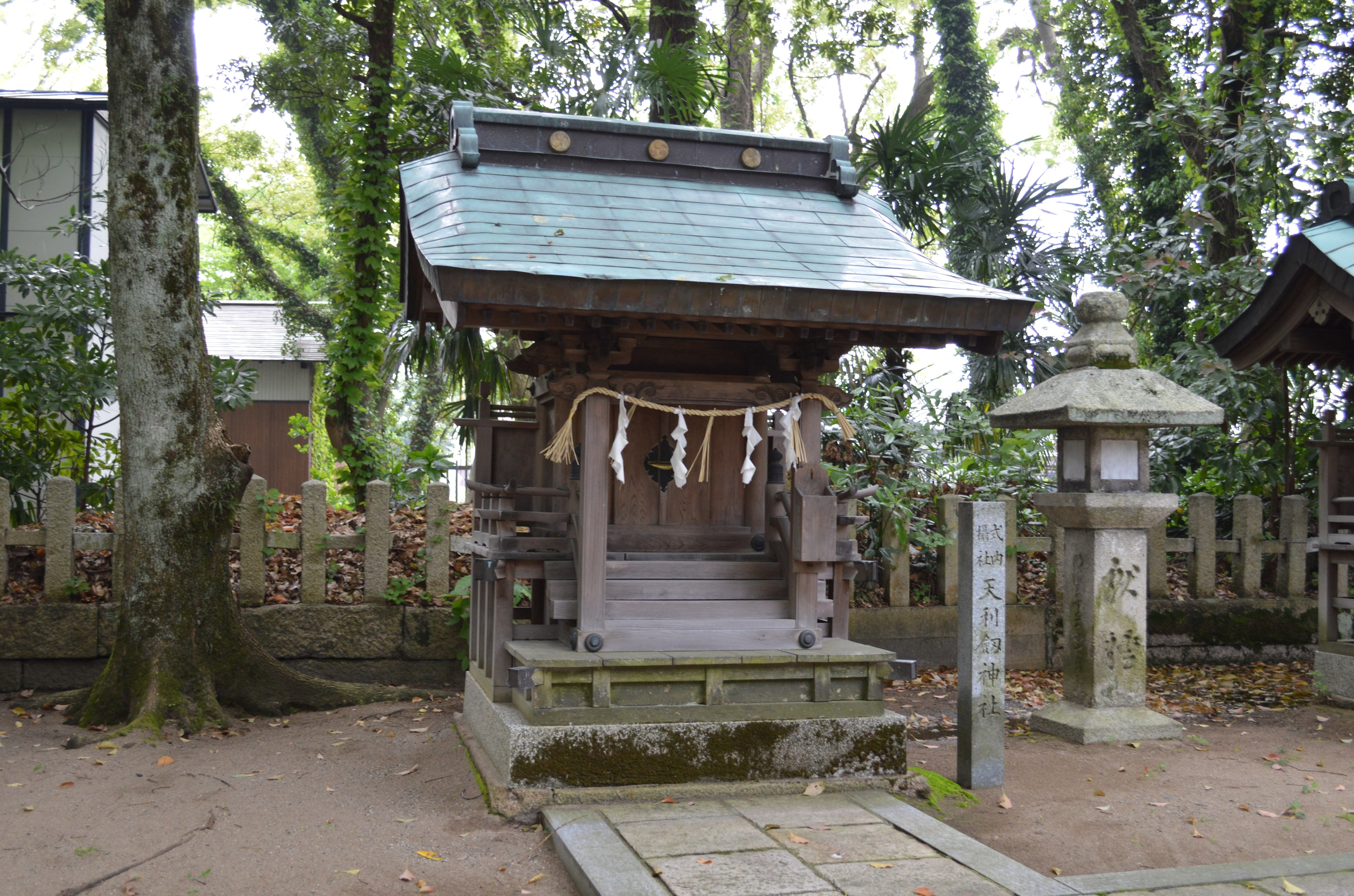 天利劔神社 (氣比神宮境内摂社)